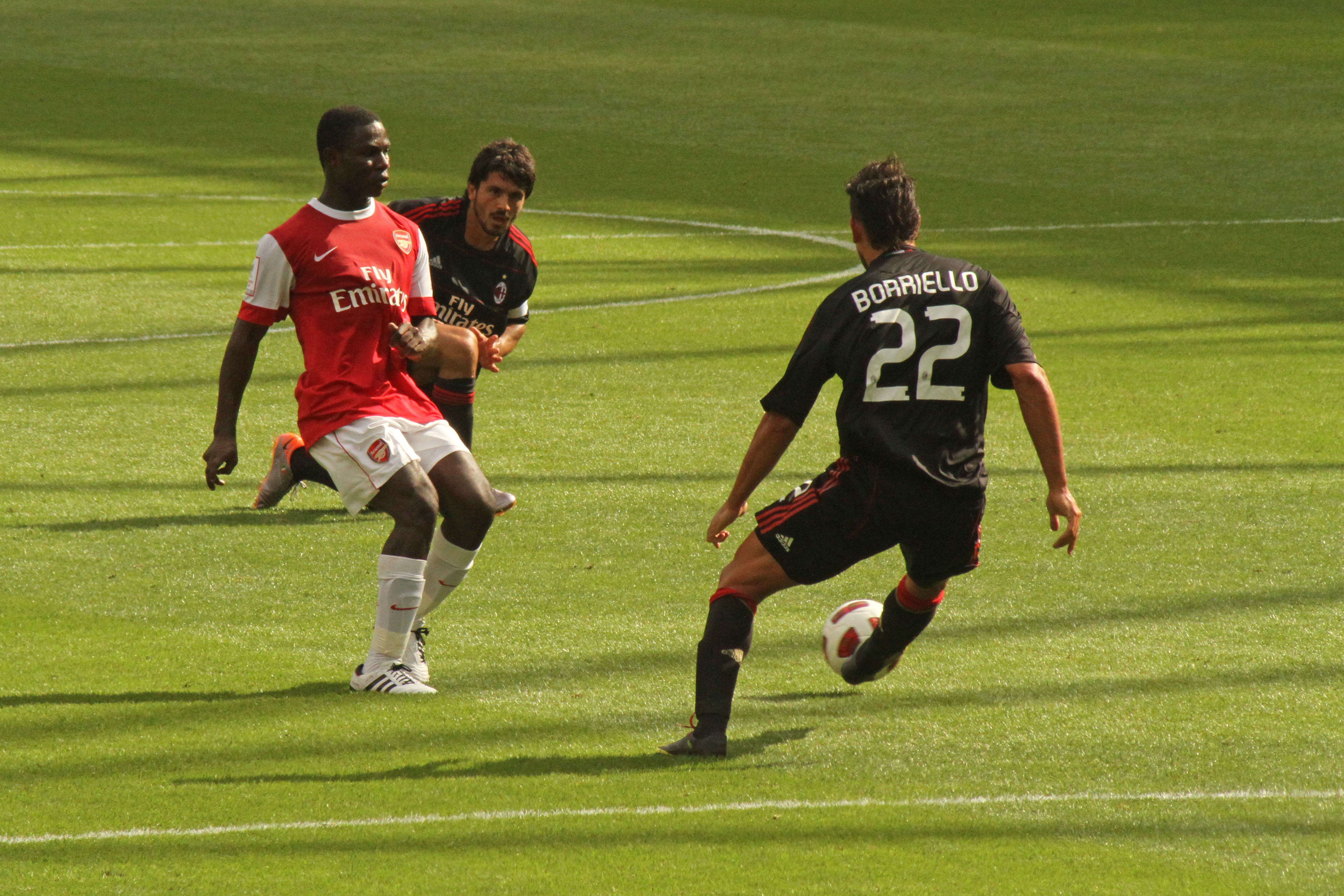 Emmanuel Frimpong, Gennaro Gattuso & Marco Borriello